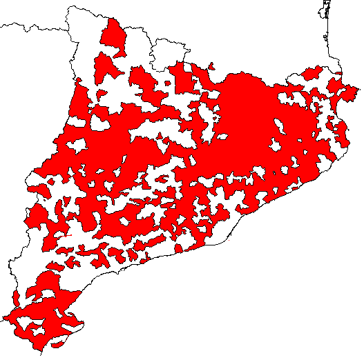 Mapa territorial del Principat de catalunya on figuren en vermell els municipis adherits a l'AMI en la seva continuïtat territorial